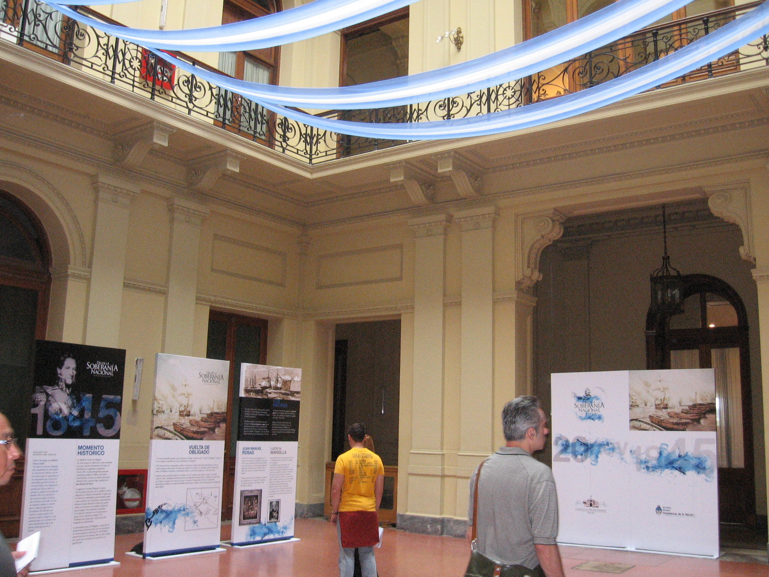 Exposición en la Casa Rosada con motivo del Día de la Soberanía